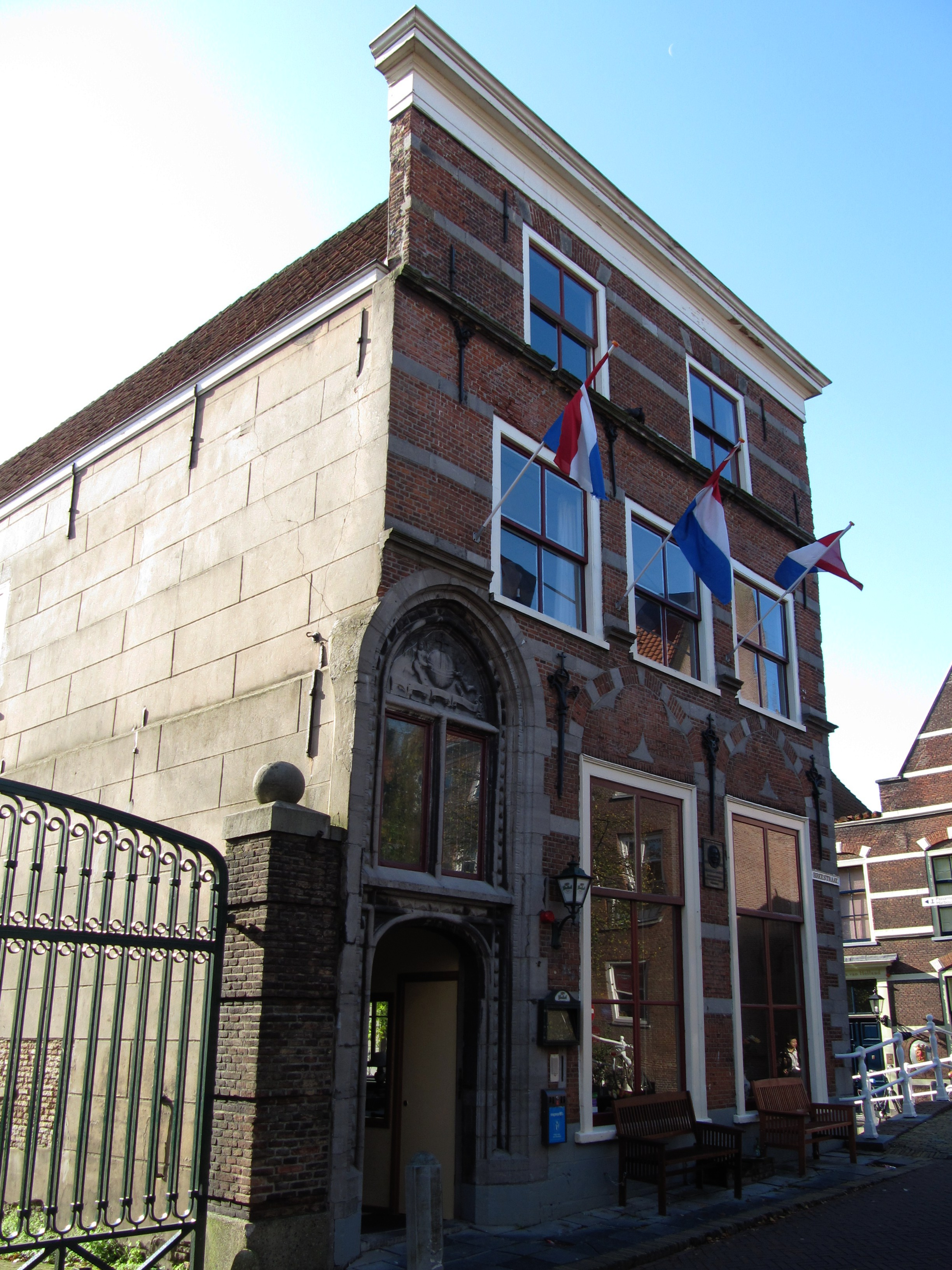 RM11744 Delft - Breestraat 1.jpg